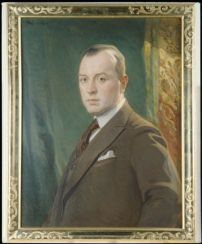 Rolf de Maré, 41 år. Porträtt av Nils Asplund, finns på Hallwylska museet i Stockholm.